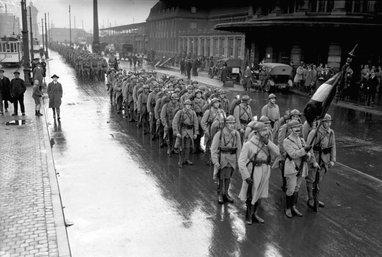 Die endgültige Räumung Dortmunds! Abzug der letzten Truppen aus Dortmund. Neueste Aufnahmen vom 22.10.1924. Die letzten Franzosen verlassen Dortmund. Blick auf dem Bahnhofplatz mit abfahrbereitem französischen Militär.